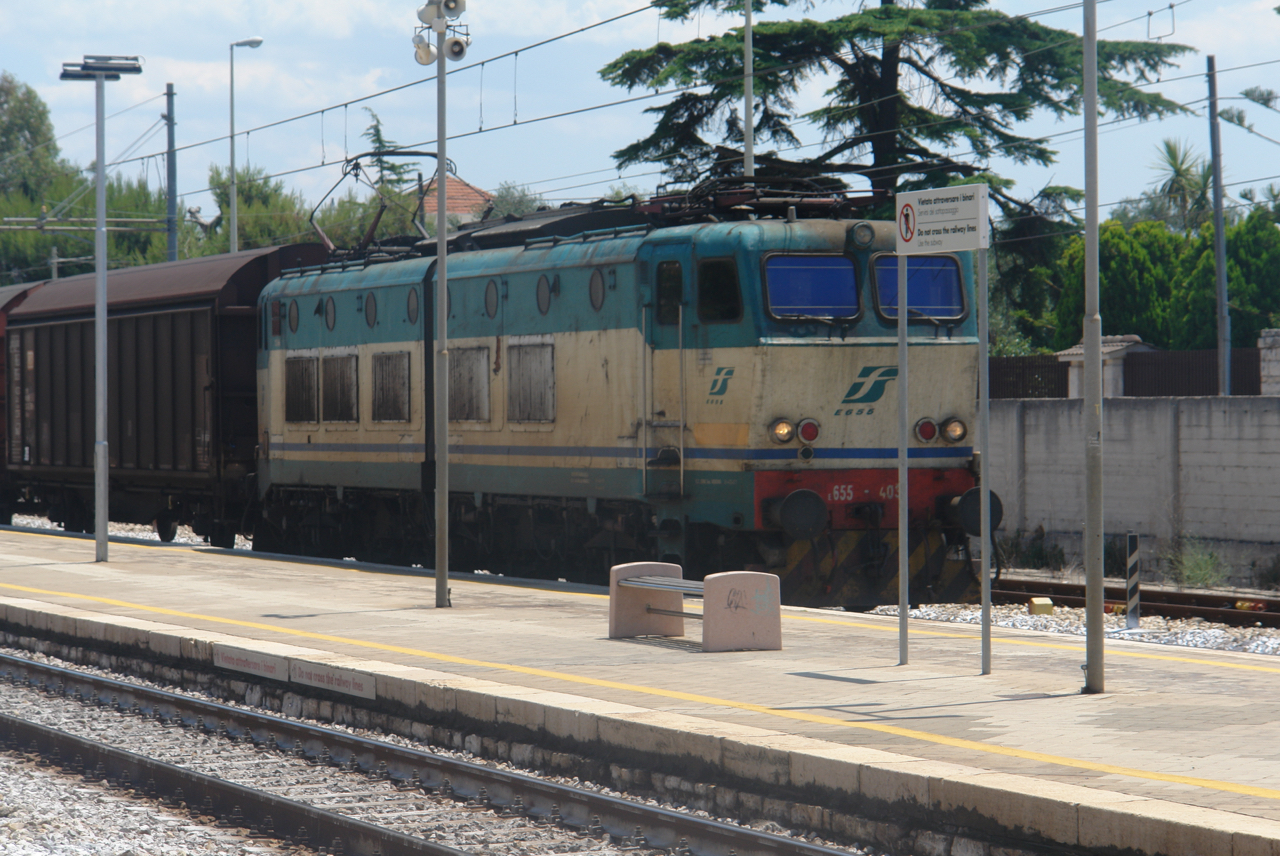 La E.655.403 che transita a Giovinazzo assegnato a un treno merci.